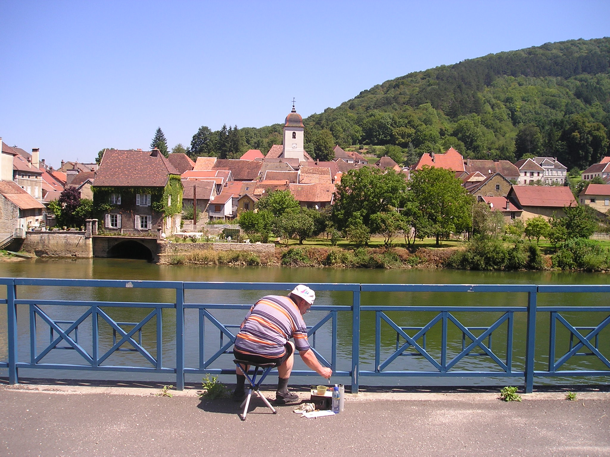 Clerval